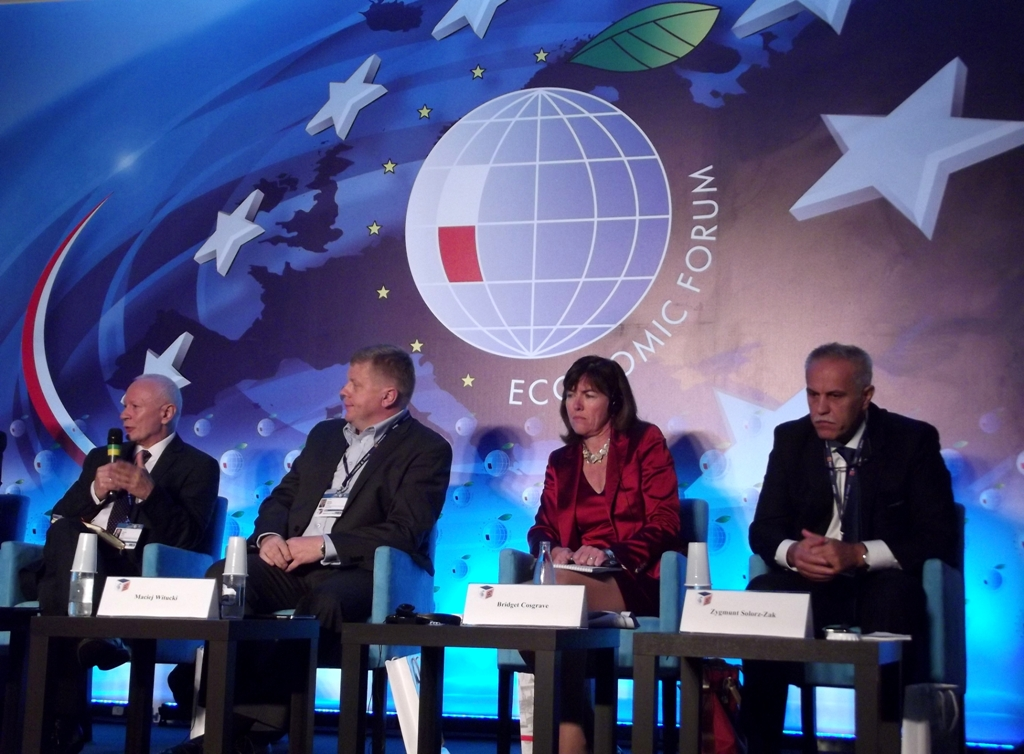 Zdjęcie zrobione podczas XXIII Forum Ekonomicznego w Krynicy-Zdroju, od lewej: Michał Boni, Maciej Witucki, ?, Zygmunt Solorz-Żak.